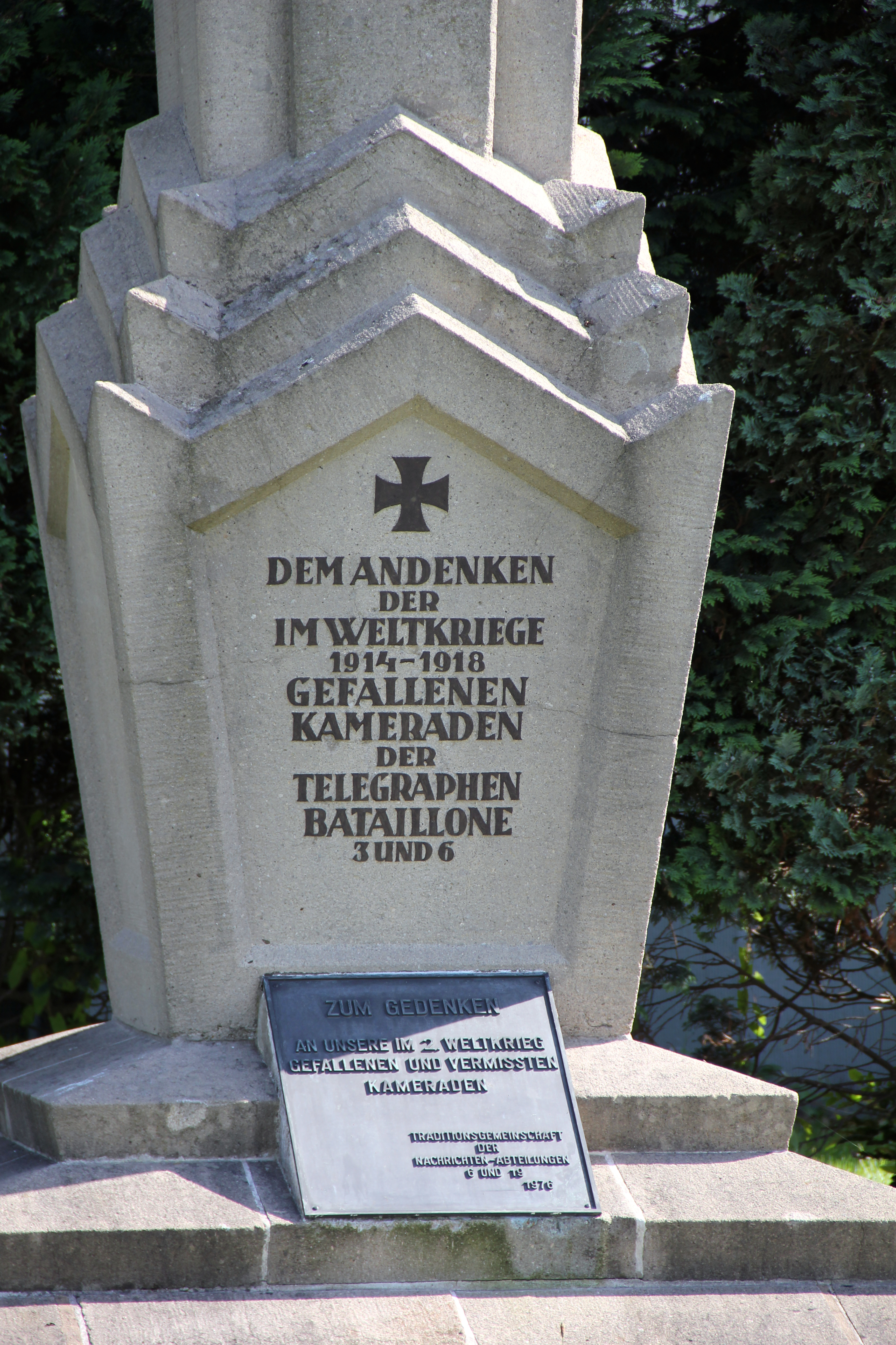 Kriegerdenkmal für die Gefallenen der Telegraphenbataillone 3 und 6 an der Nordring-Kaserne in Hannover vom 5. Oktober 1924 mit einer Ergänzung von 1976[1] Inschrift des Denkmals: DEM ANDENKEN DER IM WELTKRIEGE 1914-1918 GEFALLENEN KAMERADEN DER TELEGRAPHEN BATAILLIONE 3 UND 6 Inschrift der ergänzenden Tafel: ZUM GEDENKEN AN UNSERE IM 2. WELTKRIEG GEFALLENEN UND VERMISSTEN KAMERADEN TRADITIONSGEMEINSCHAFT DER NACHRICHTEN-ABTEILUNGEN 6 UND 19 1976